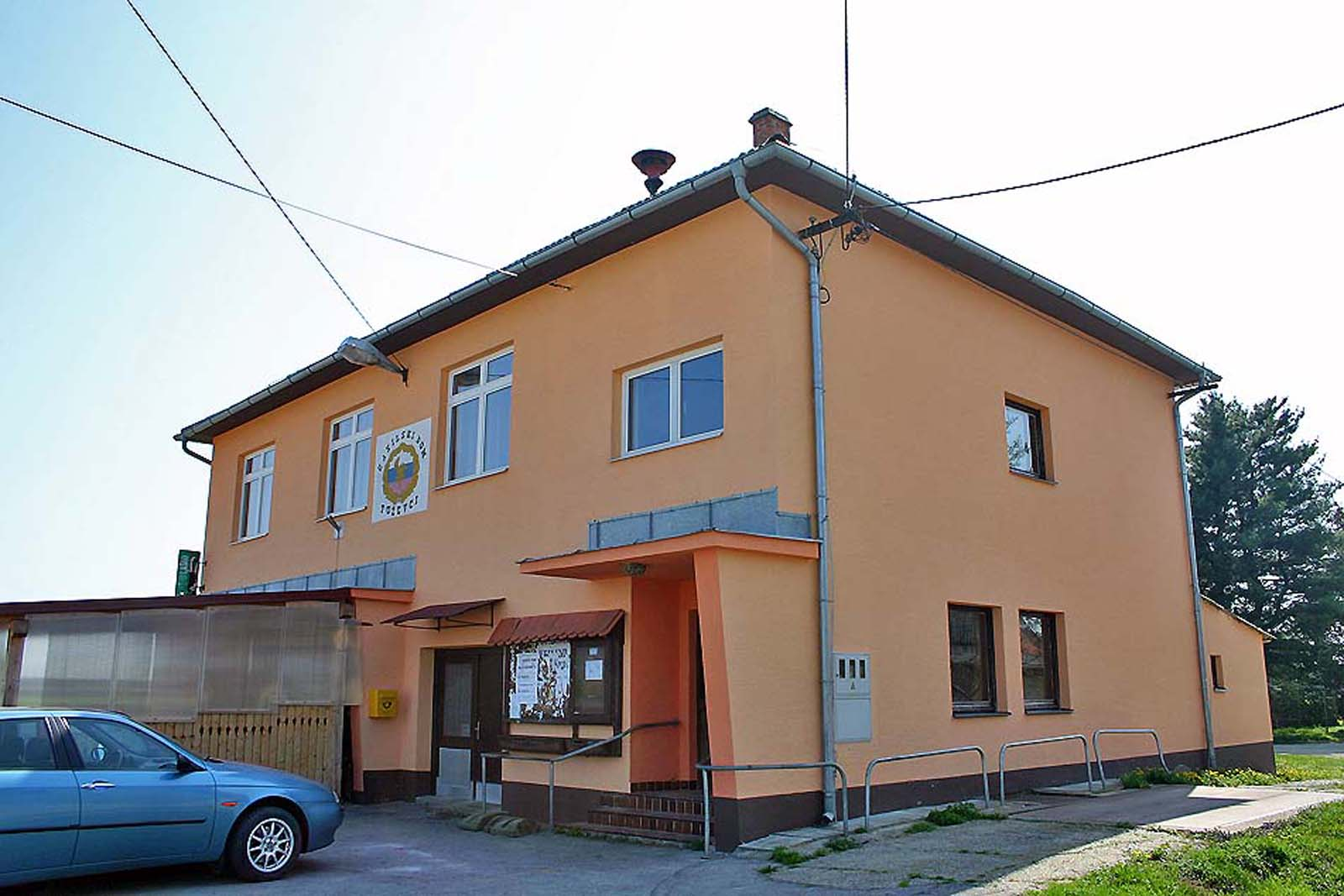 Prostovoljno gasilsko društvo Puževci. Volunteer fire Puževci. Freiwillige Feuerwehr Puževci.